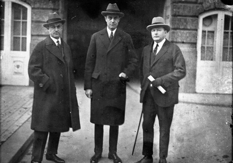 William A. Harriman, der amerikanische Multimillionär und Groß-Industrielle weilt augenblicklich in Berlin, um mit Vertretern von Sowjet-Russland wegen einer Riesenkonzession von Manganerzen zu verhandeln. Die Verhandlungen stehen vor dem Abschluß und bedeuten dieselben einen wichtigen Beschluß in der kommenden Wirtschaftspolitik. Die deutschen Interessen werden von der Diskonto-Gesellschaft in Berlin vertreten. Mitte, William A. Harriman, links Oberst Rossi, Berliner Vertreter der Harriman-Gruppe, Rechts S. D. Weyer, Korrespondent der International News-Service, Berlin.